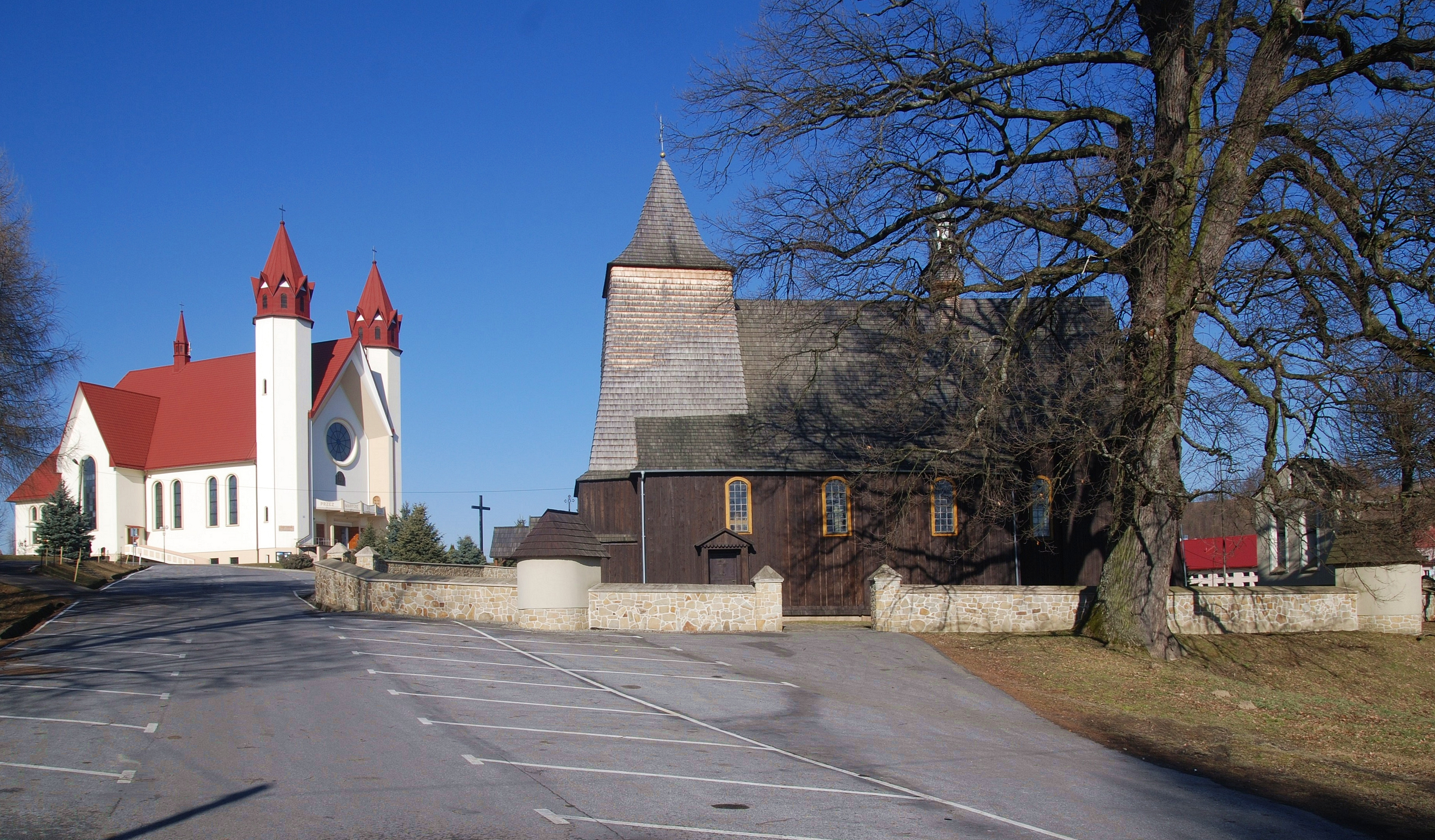 kościół